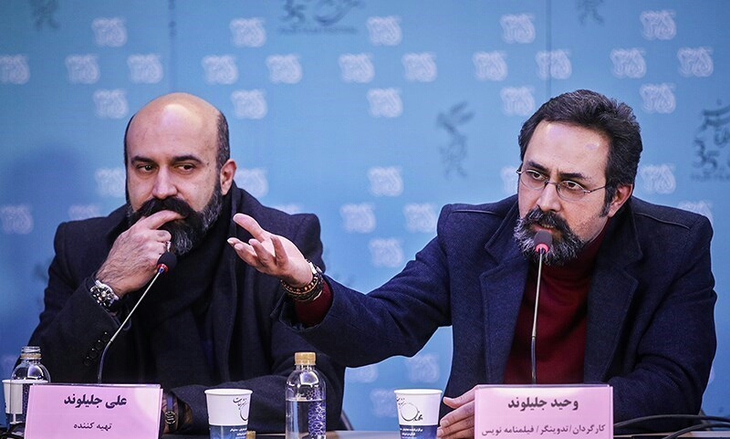 نازنین بیاتی و علی جلیلوند - بهمن ۱۳۹۵